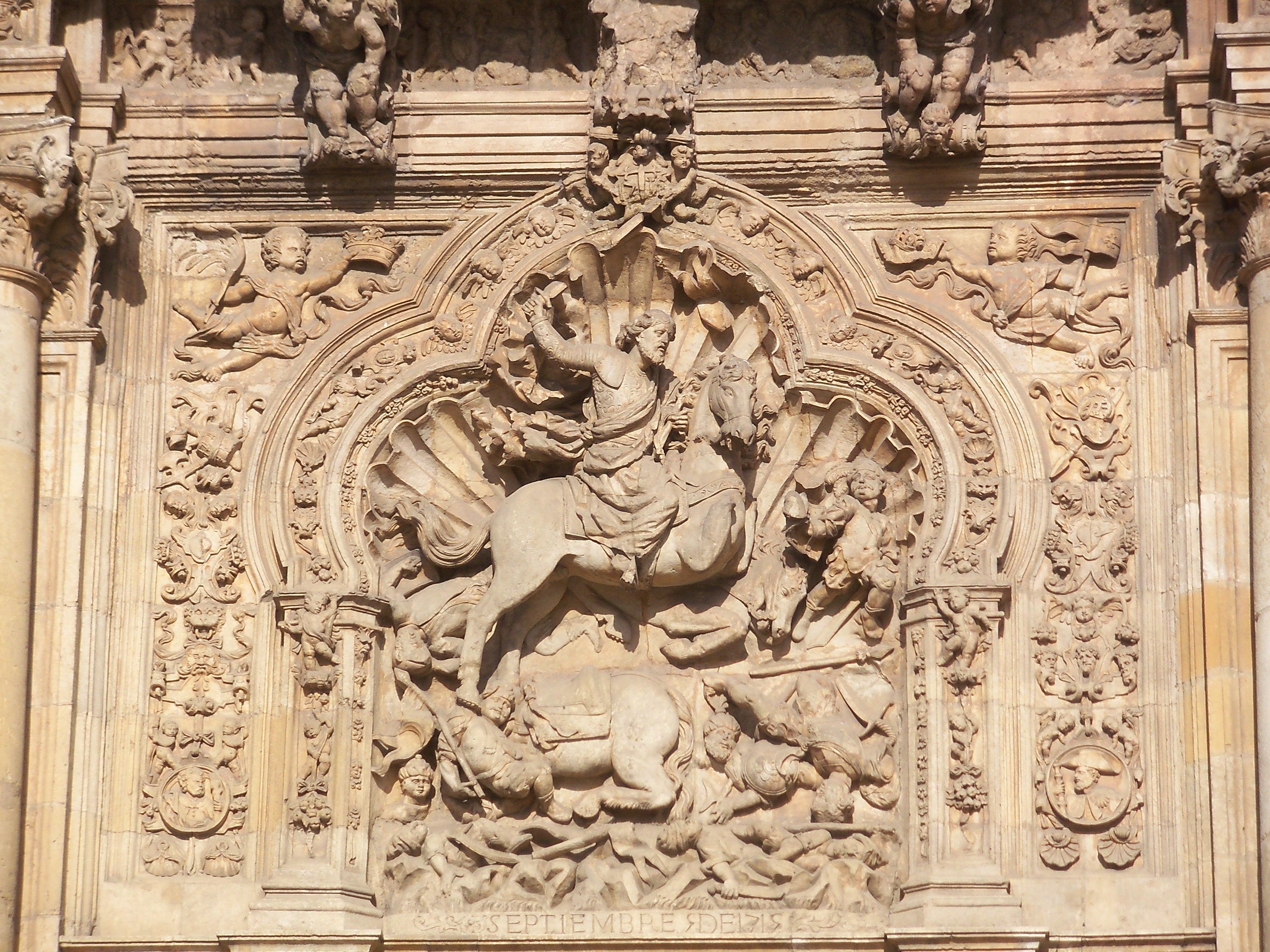 San Marcos de León. Detalle de la fachada principal.